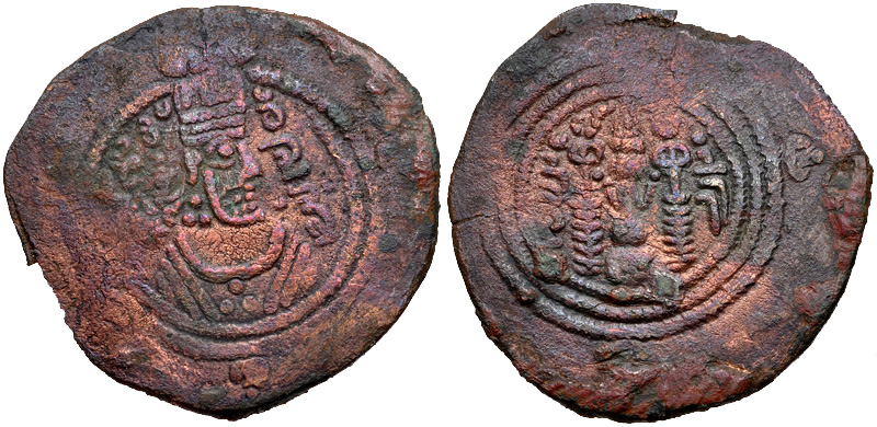 Paxir sassânida recunhado pelo califa omíada Iázide II.